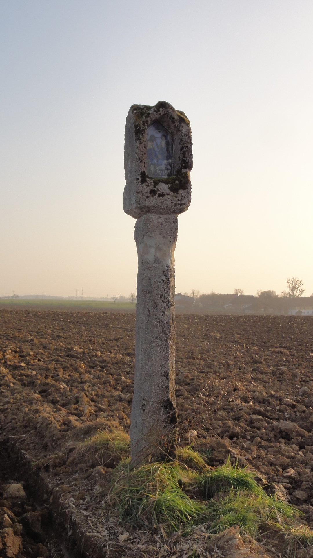 Sog. Pestsäule, Pestsäule Siebeneichen, Steinhaus, Oberösterreich